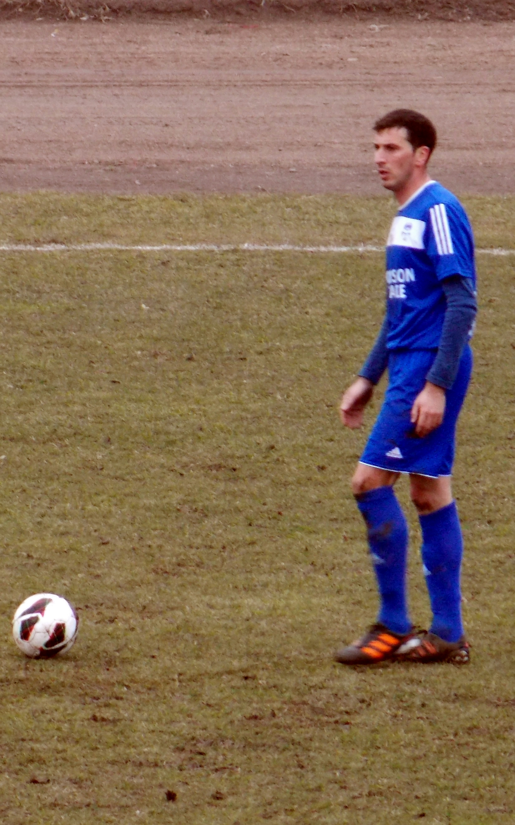 Fotografia fotbalistului Laurentiu Ivan